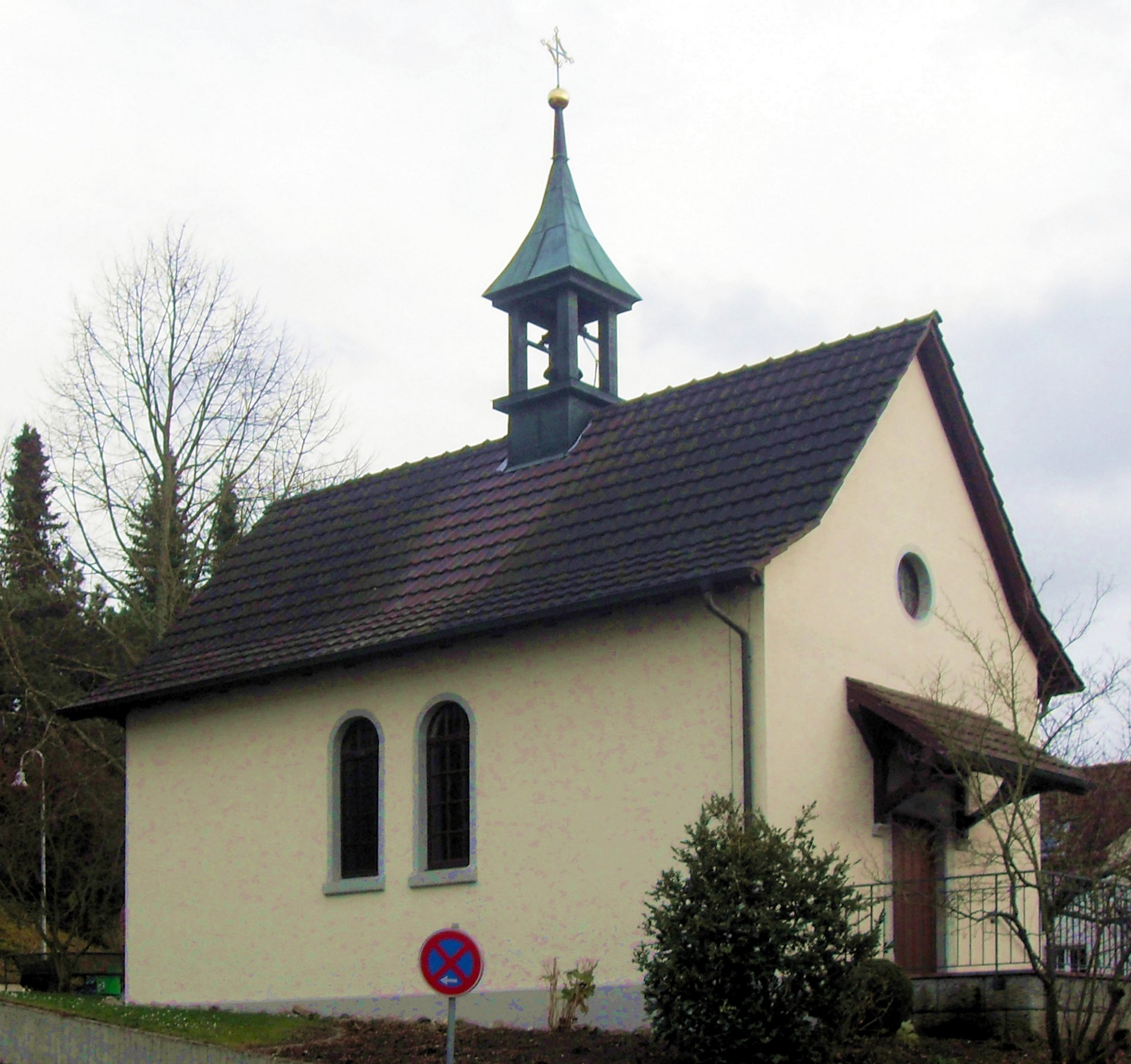 Dorfkapelle in Hegne, Gemeinde Allensbach, Landkreis Konstanz